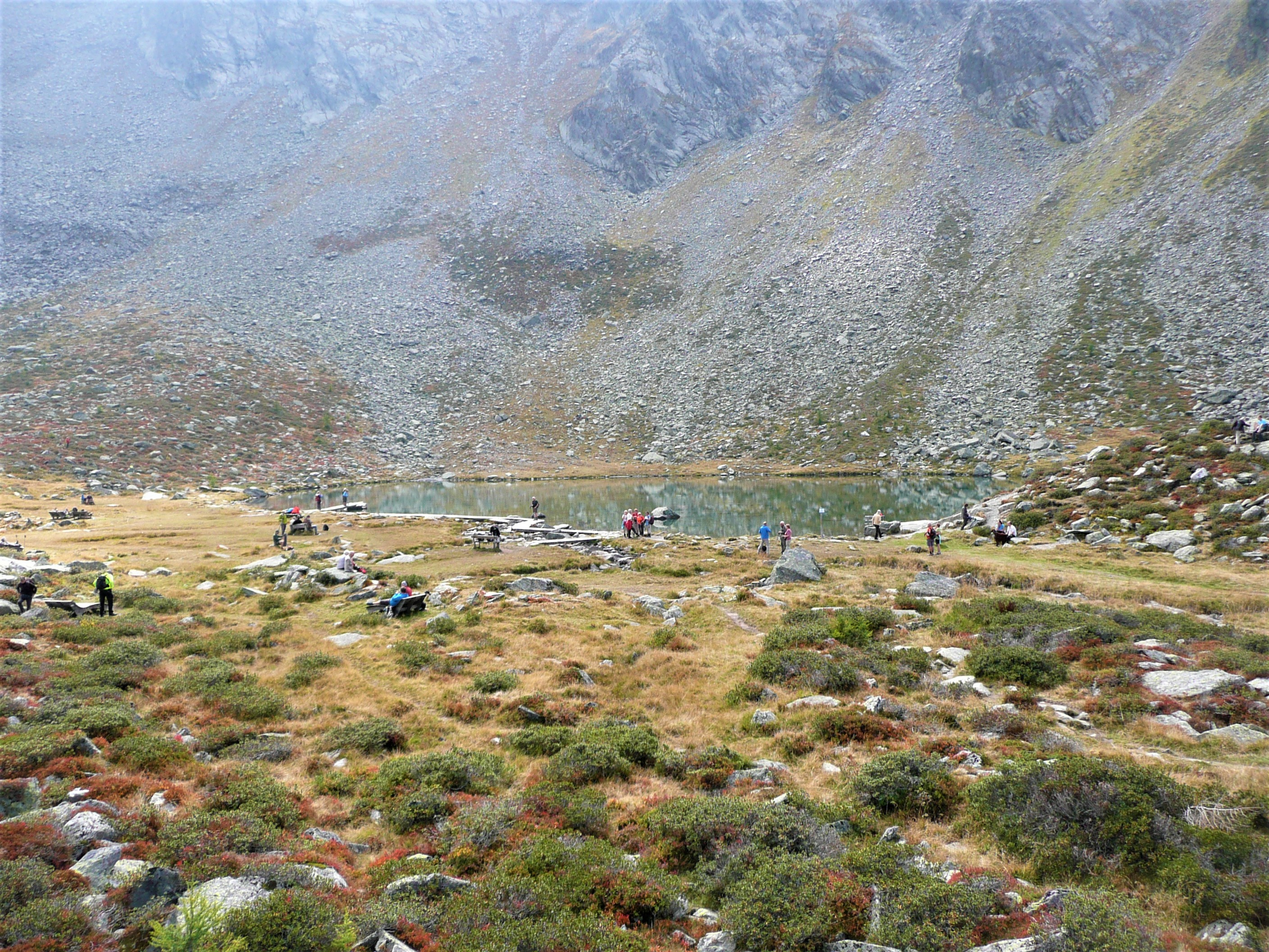 Der Klaussee im Skigebiet Rieserferner Ahrn